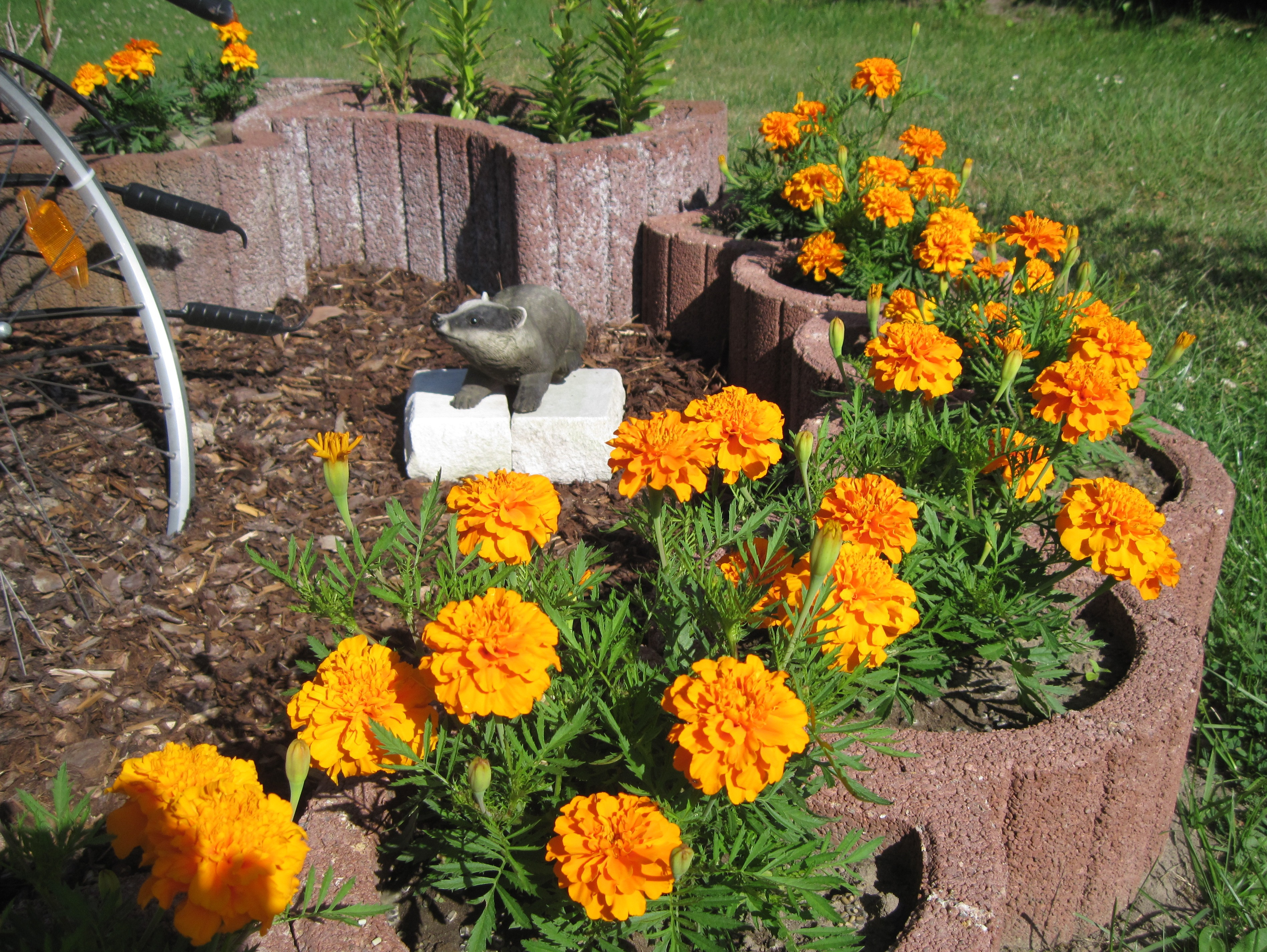 Kleinblumige Tagetes/Studentenblume als Garten-Zierpflanze